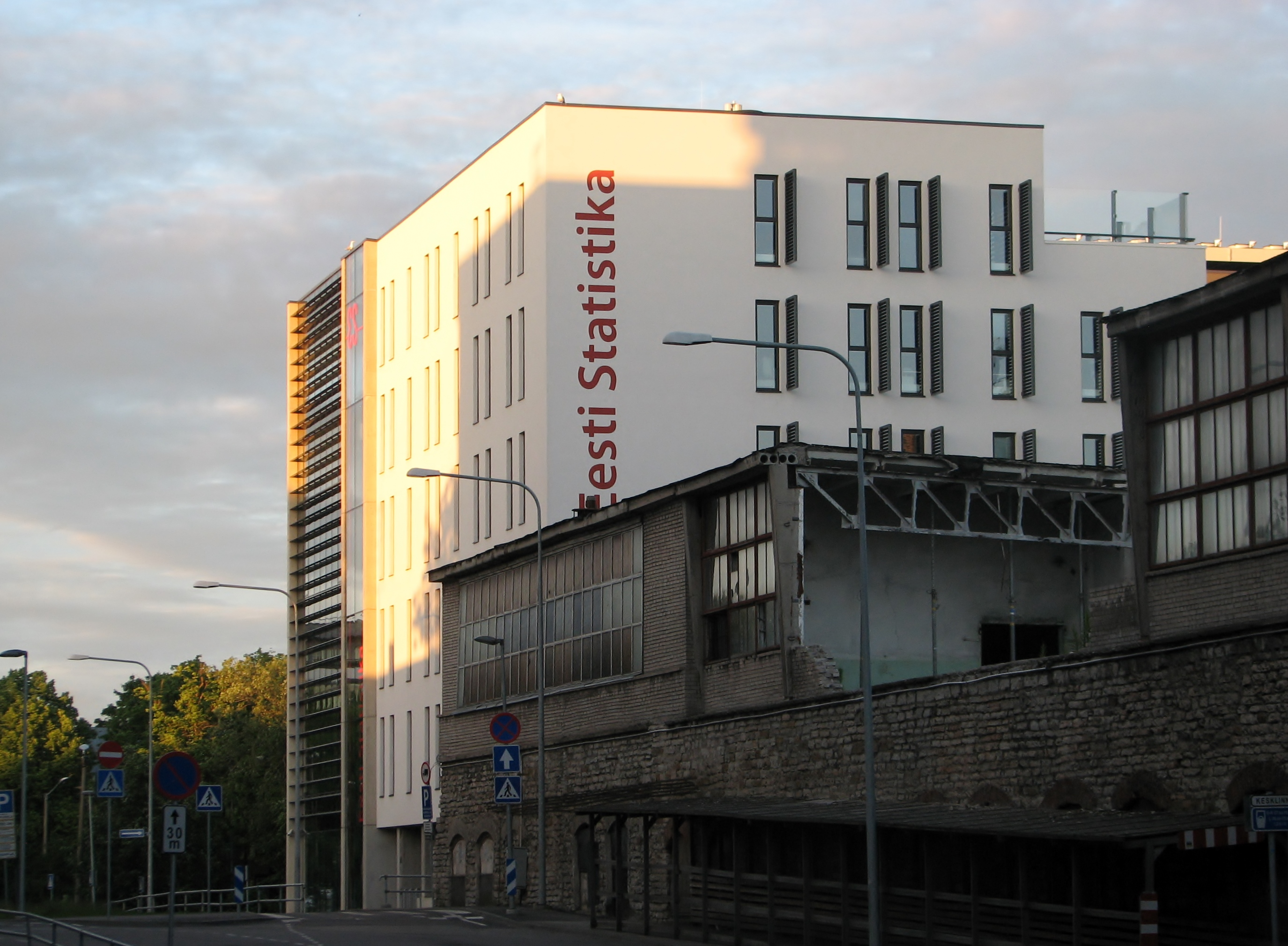 Eesti Statistikaameti hoone Tatari 51 Tallinnas